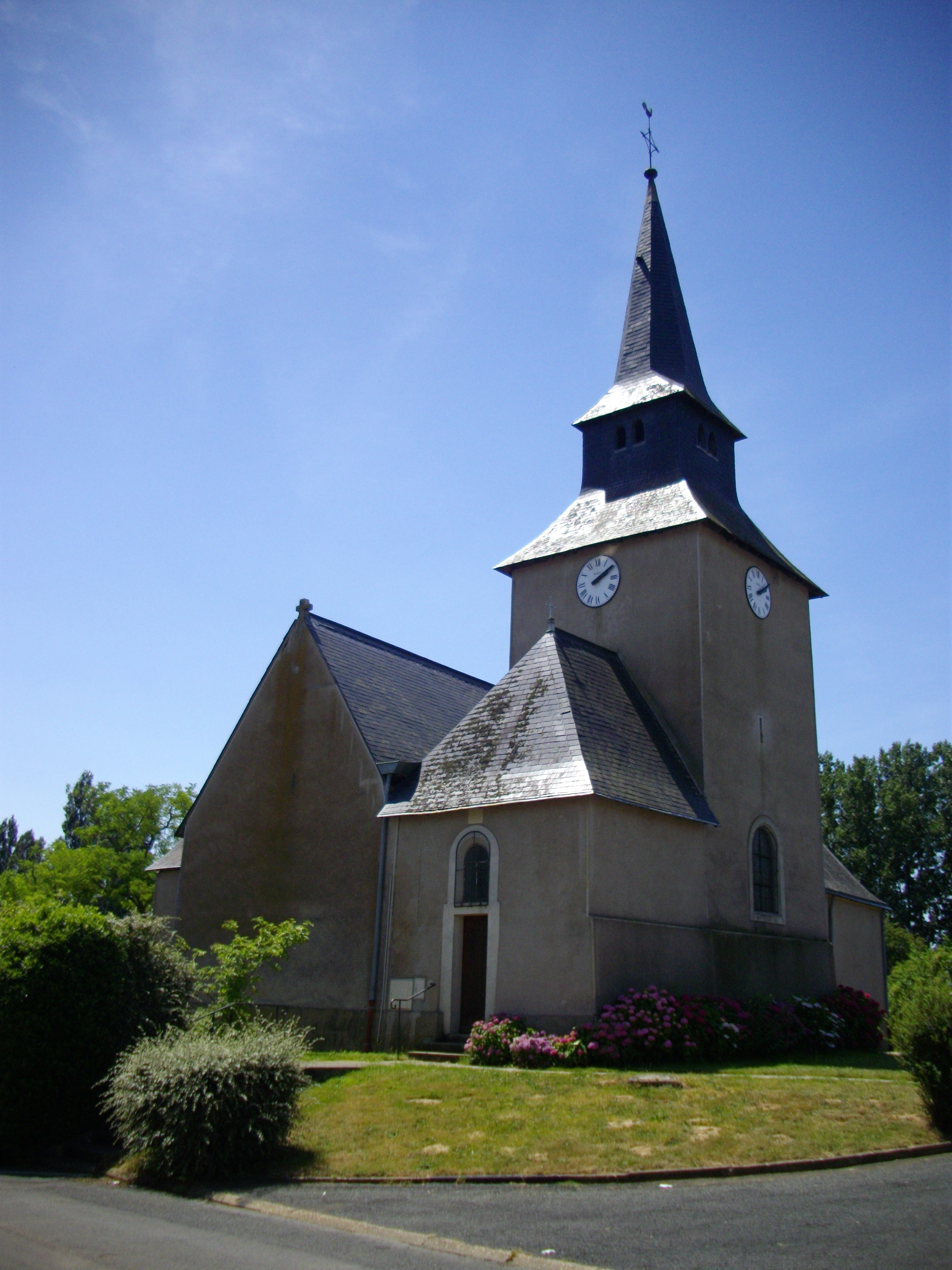 Église de Voivres, probablement du 11ème, bâtie sur une ancienne motte féodale.